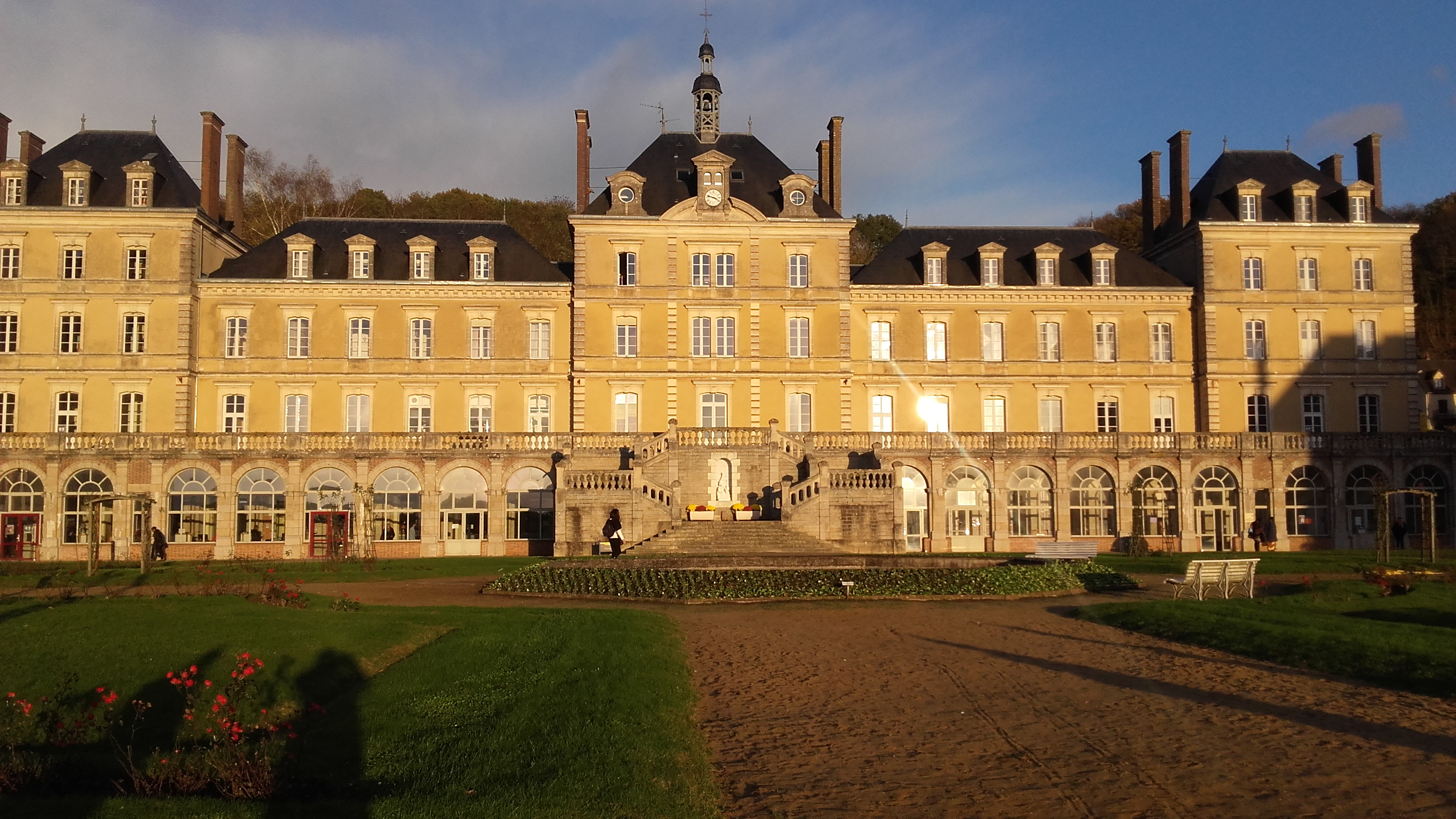 Sanctuaire de Montligeon : bâtiment Ermitage